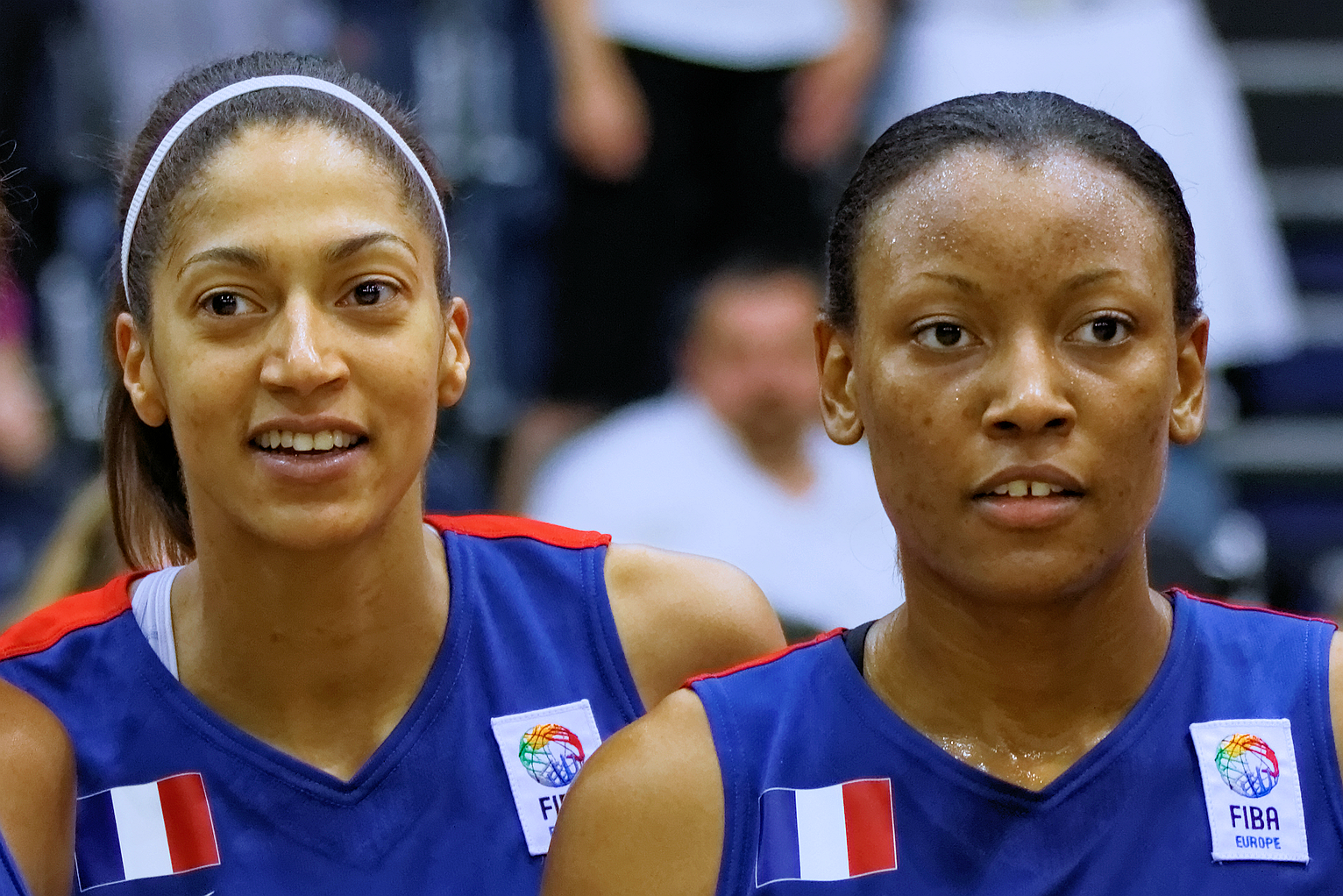 Emmeline Ndongue et Diandra Tchatchouang lors du match France - Canada pendant l'EuroEssone, le 7 juin 2013.